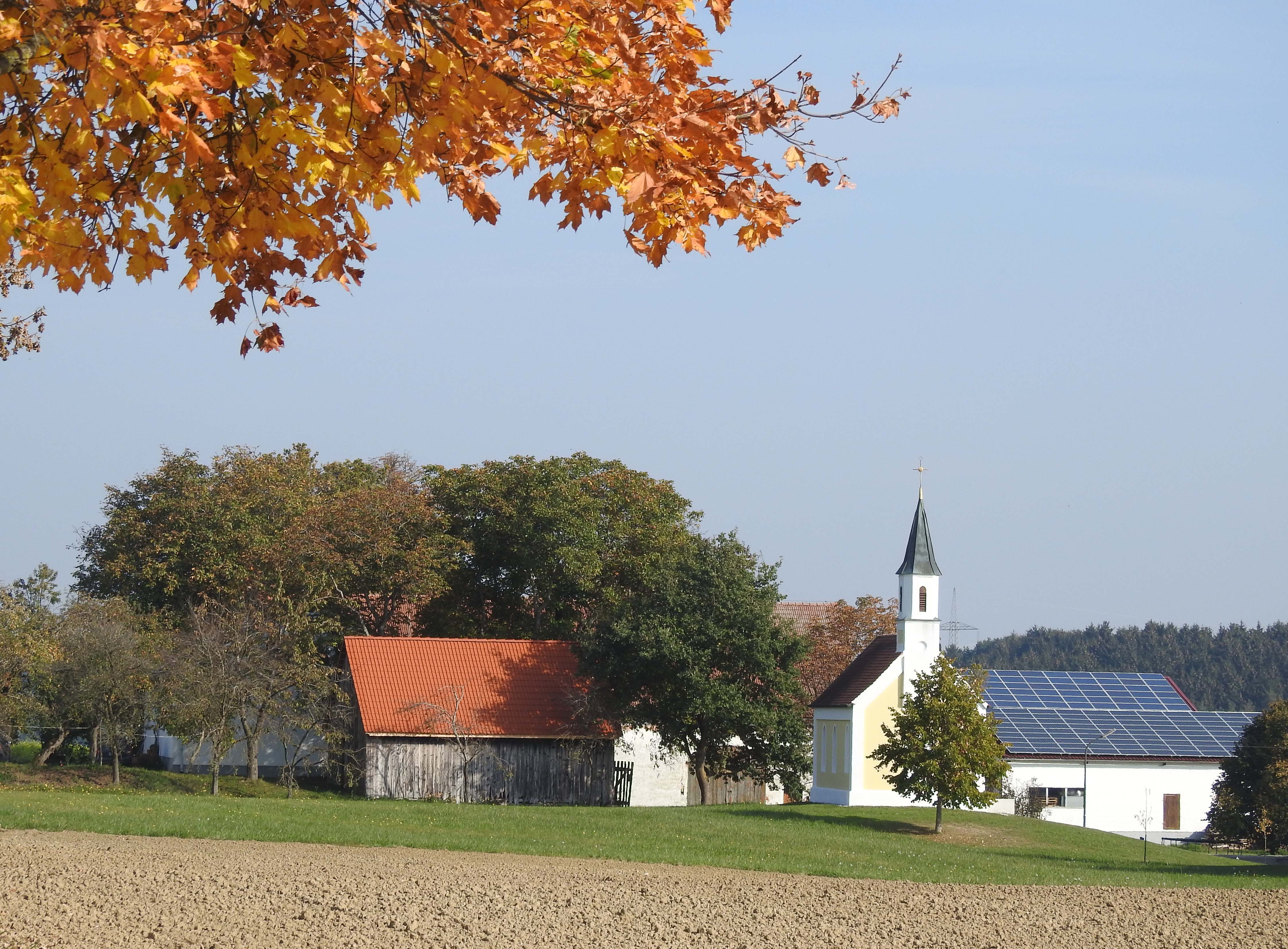 Kapelle in Radenzhofen, Altomünster